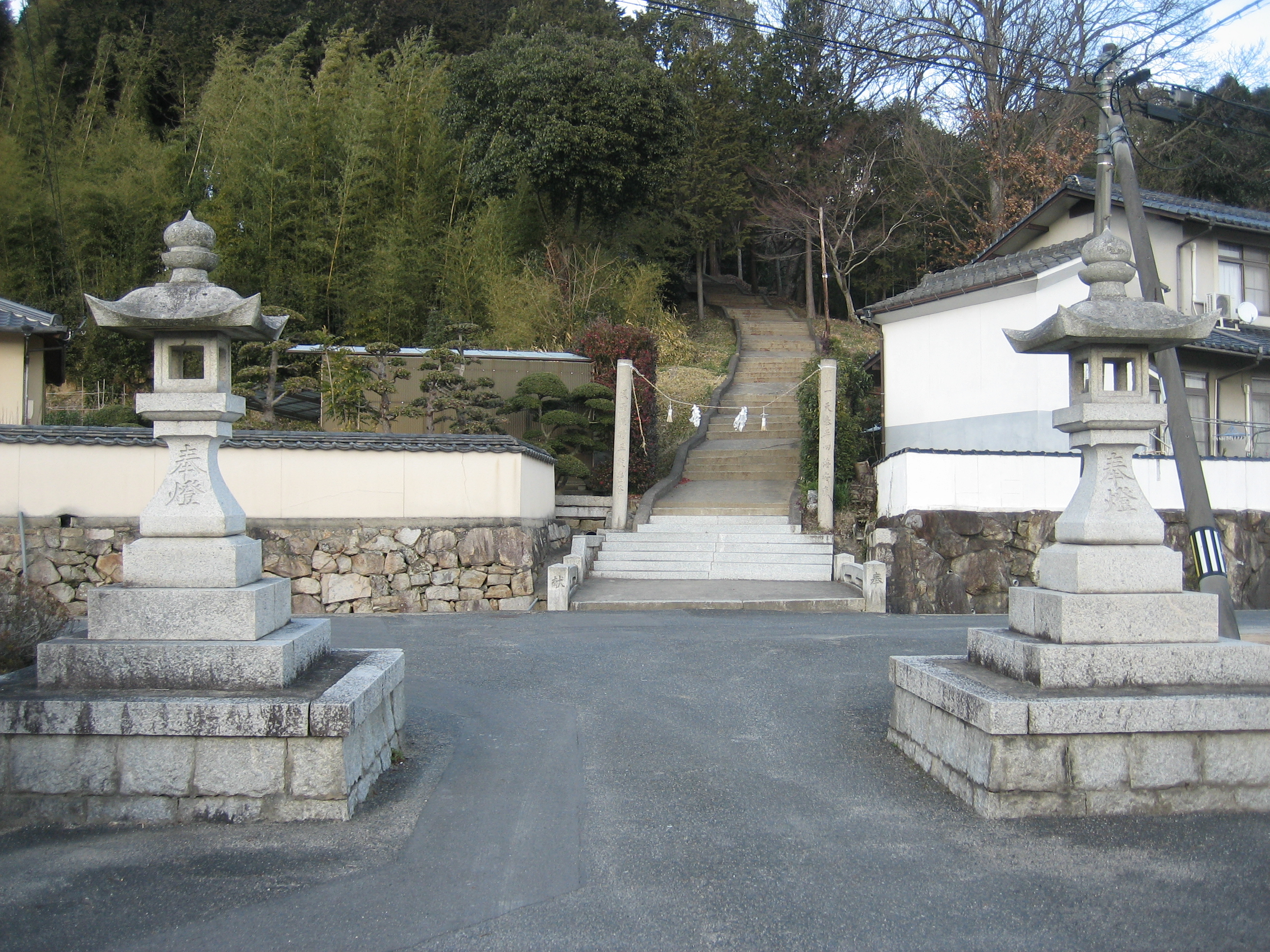 Nj-sando